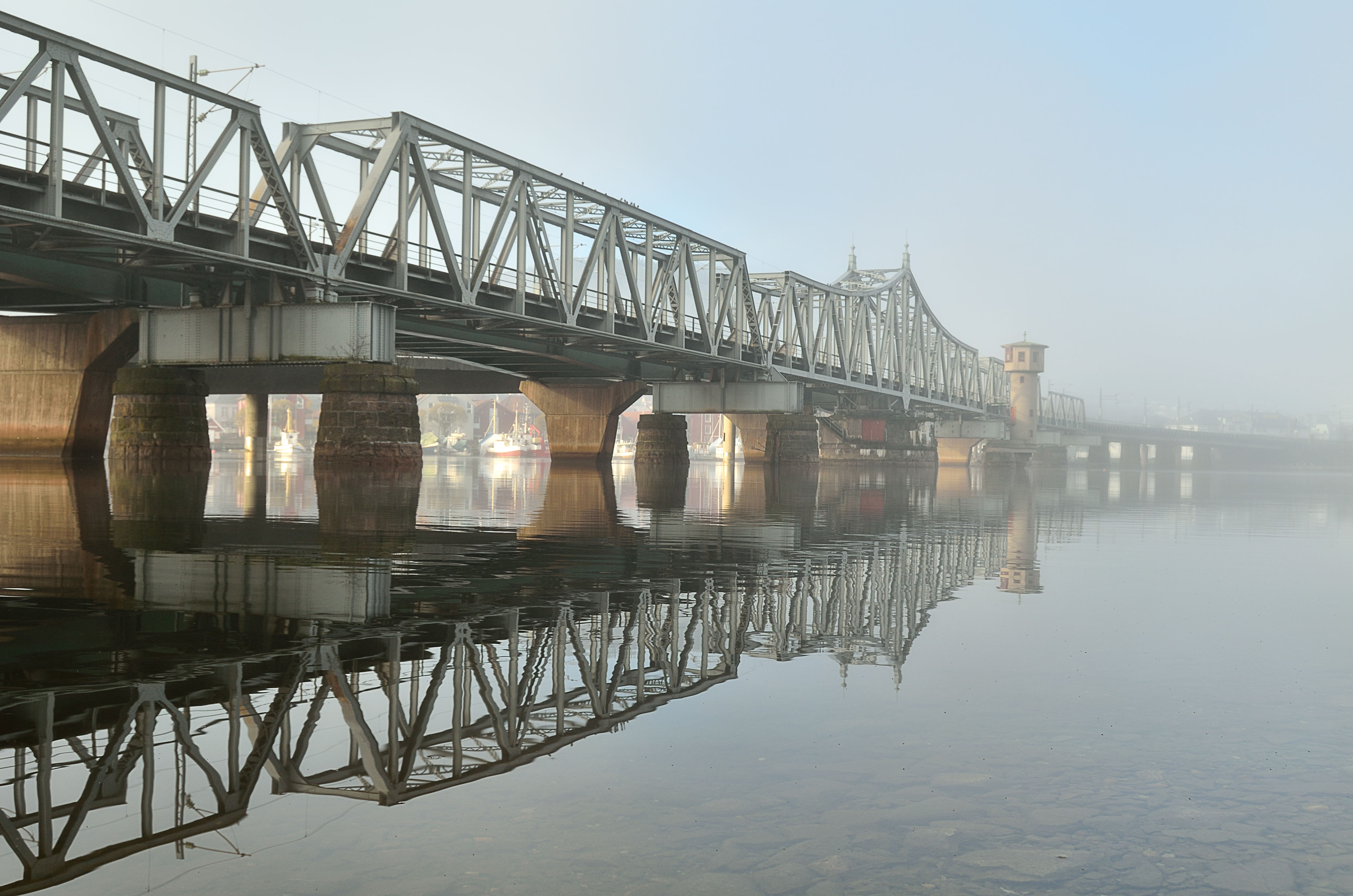 Jernbanebroa i Drammen